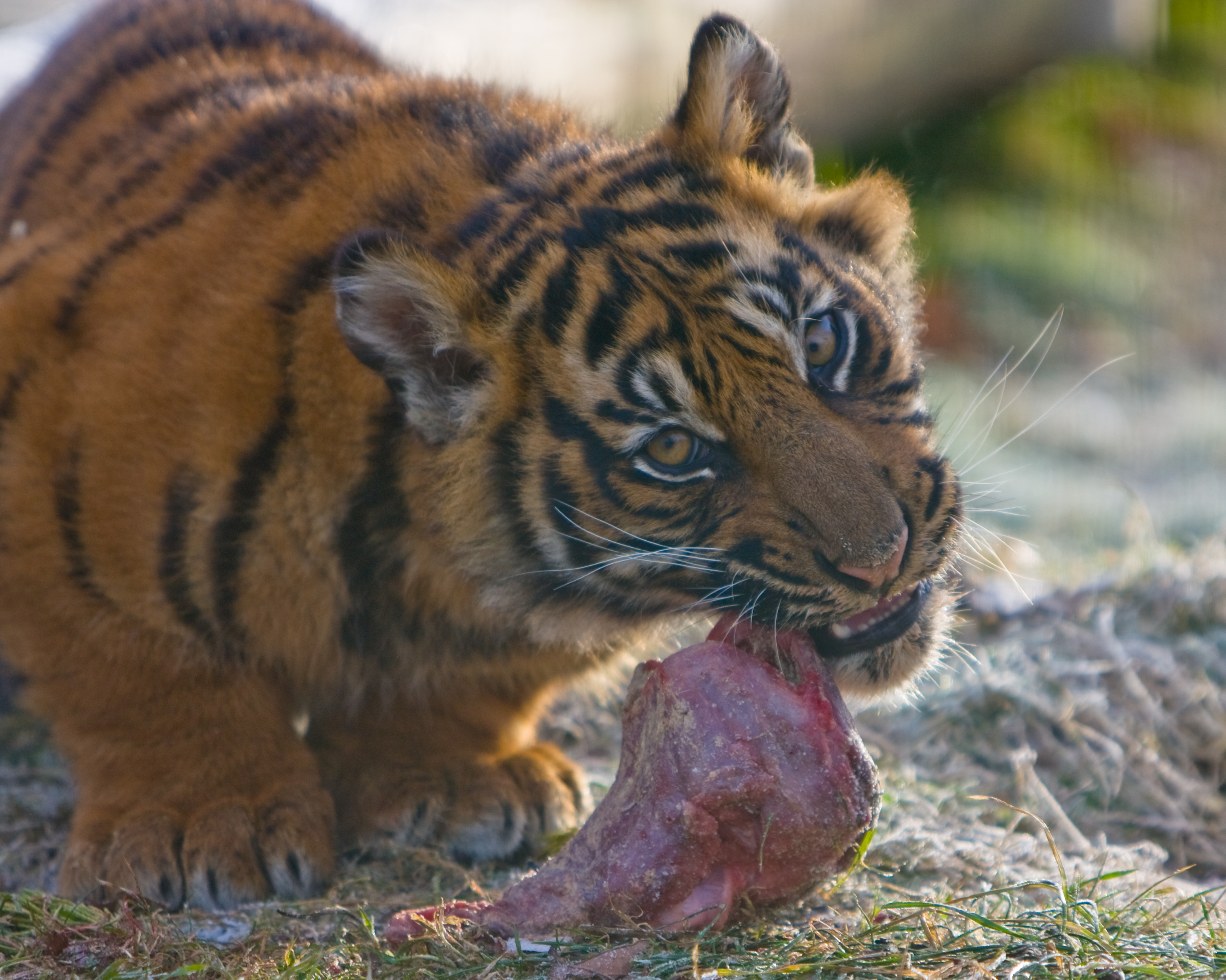 Un jeune tigre croque un morceau de viande au Wildlife Heritage Foundation